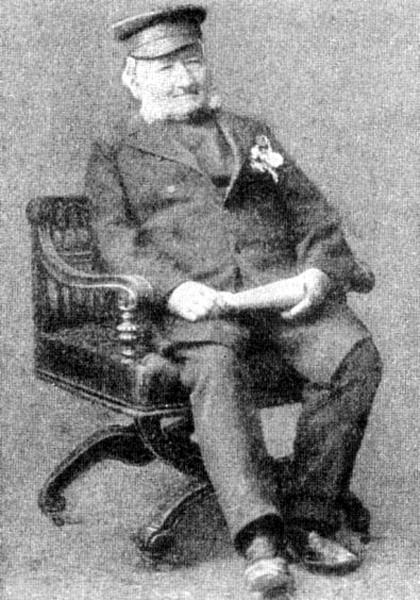 Summary Johann Dzierzon Naturforscher und Bienenkundler Foto hochgeladen von Benutzer Benutzer:AxelHH, März 2006